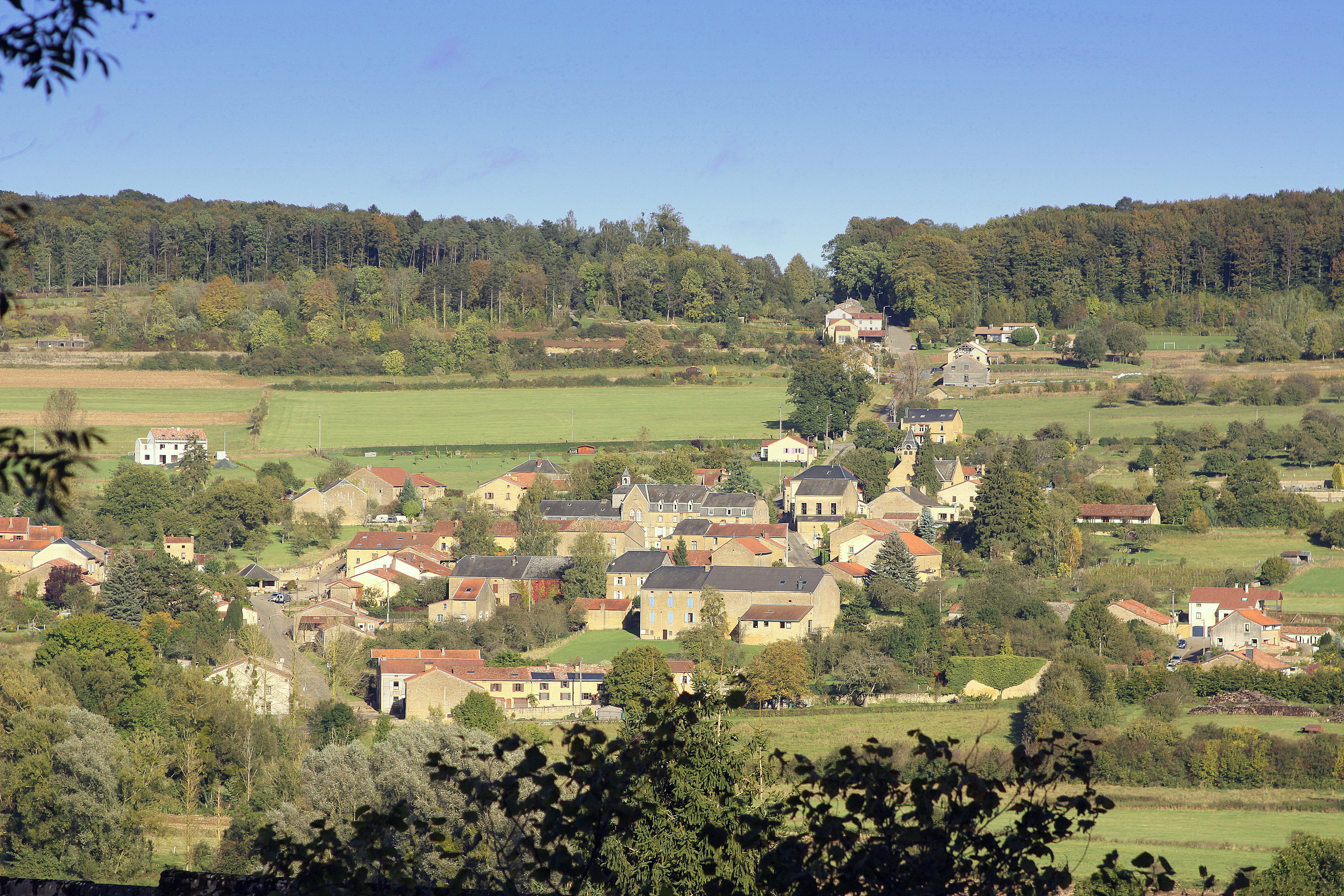 Torgny vum Fort de Velosnes aus gesinn